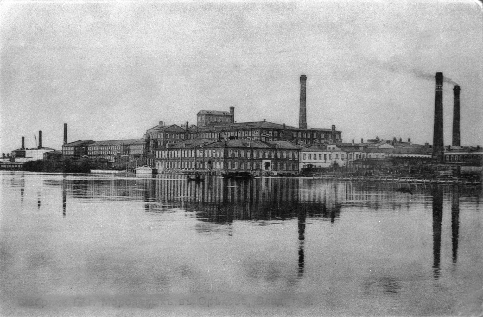 Здание Никольской мануфактуры, принадлежавшей Морозовым